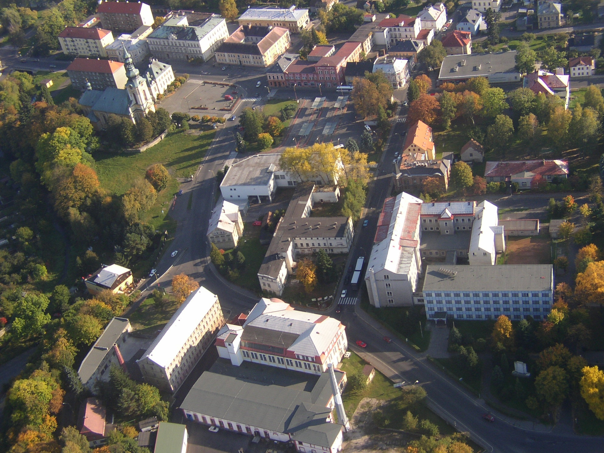 Letecký snímek náměstí ve Varnsdorfu.